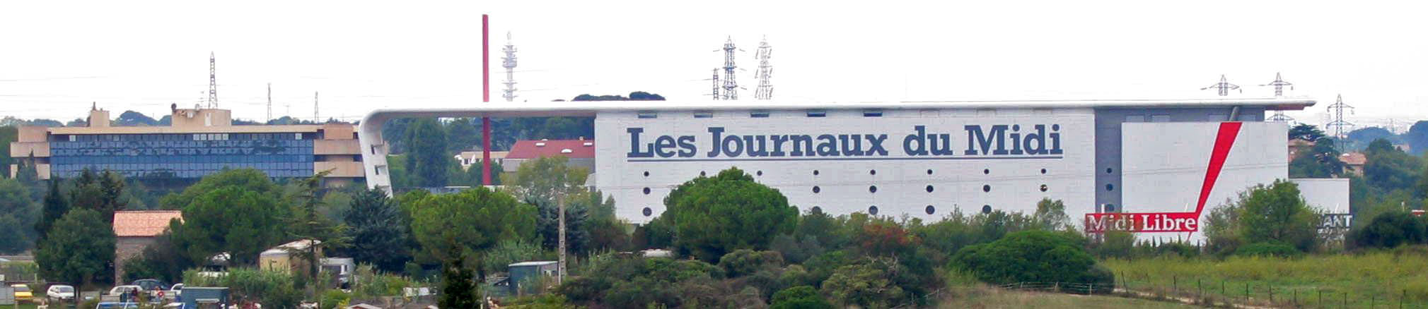 Les locaux du quotidien Midi Libre à Montpellier (en fait Saint-Jean-de-Védas) au bord de l'Autoroute A9.